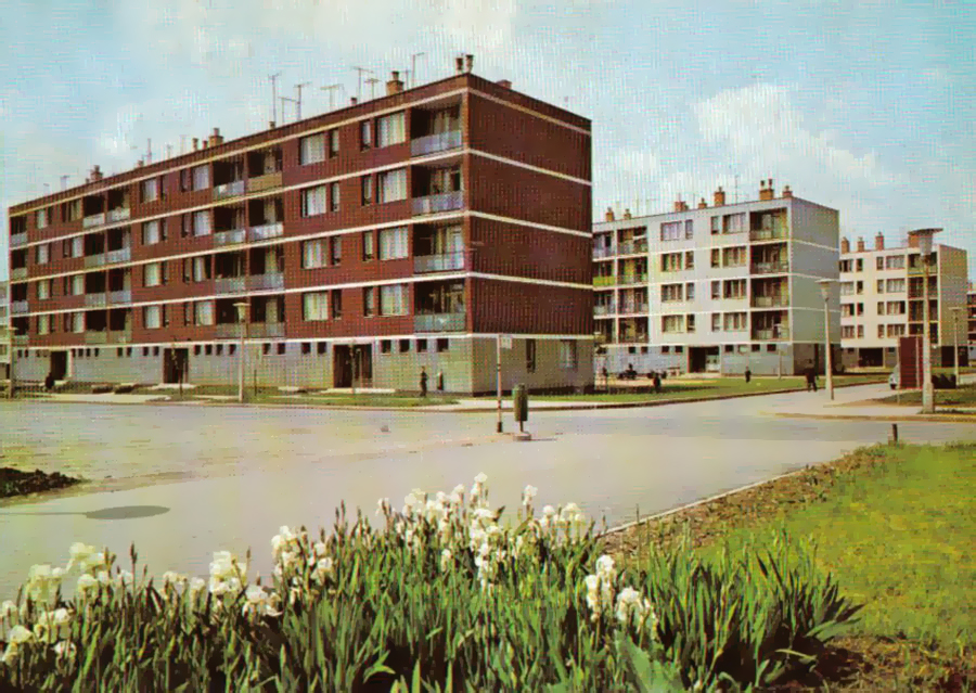 Gyöngyös, 80-as lakótelep fénykorában 1974-es képeslap